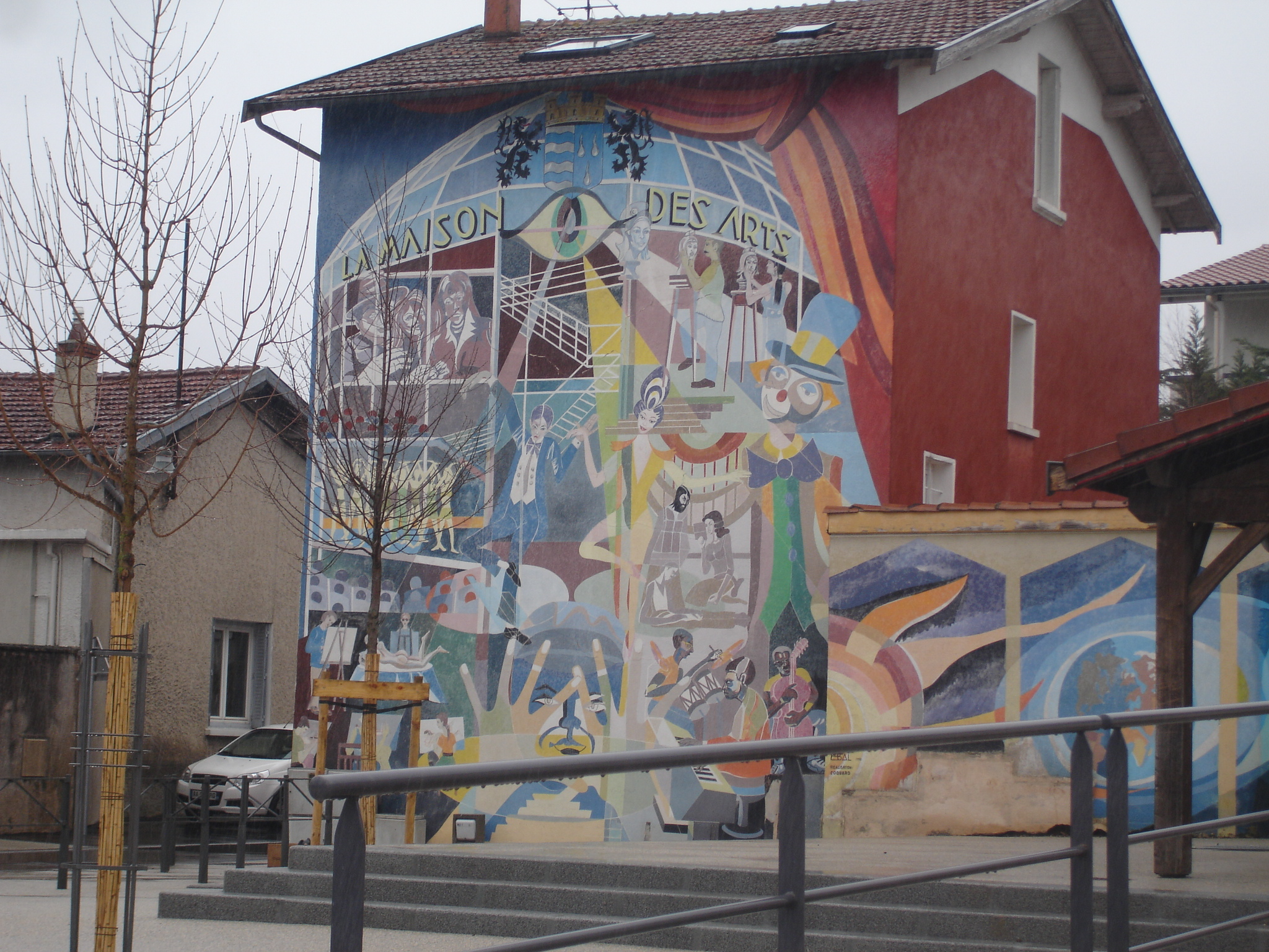 Mions (69) : fresque de la maison des arts